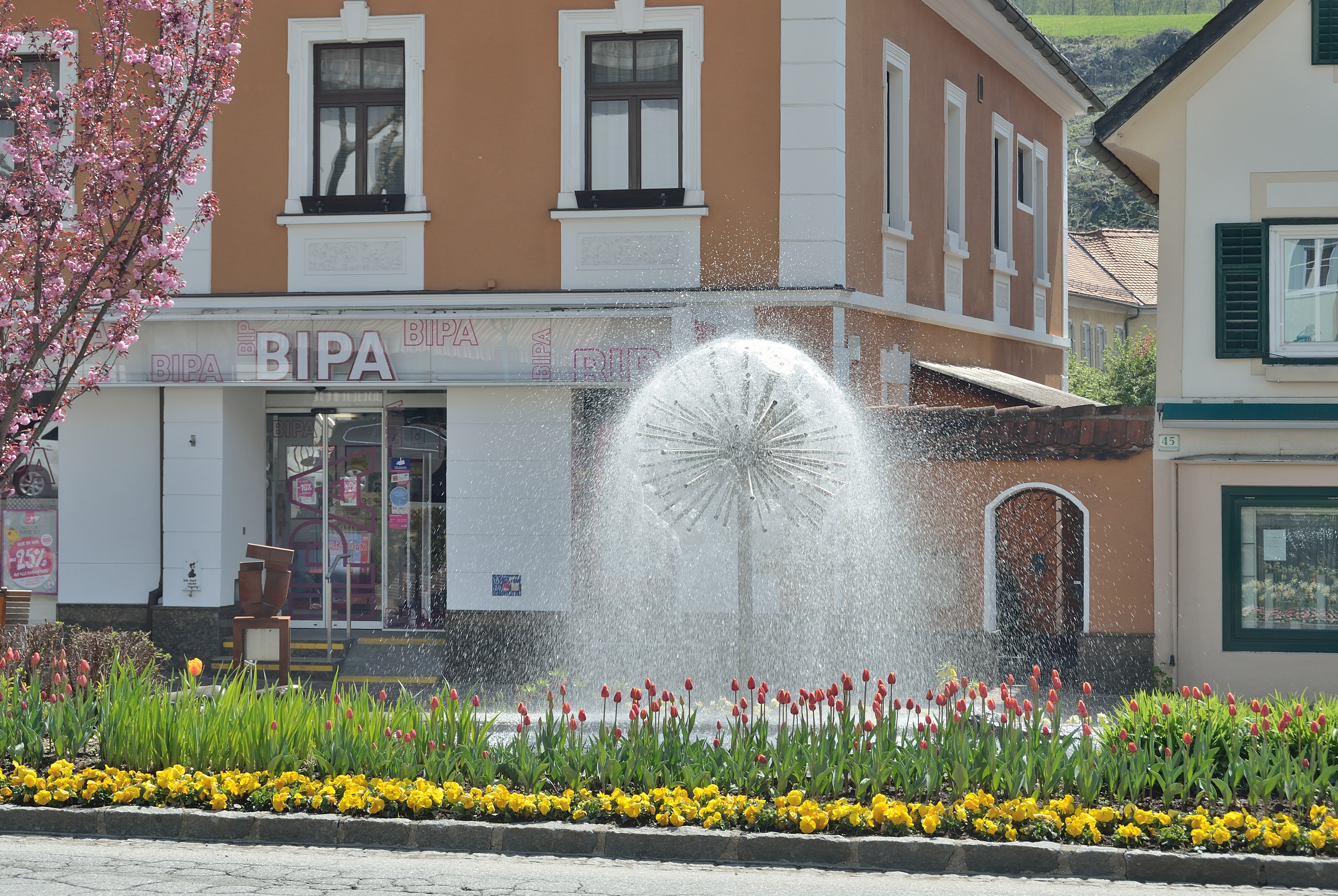 Der Franz Gruber Brunnen in Kindberg, Steiermark. Er ist nach dem langjährigen Fremdenverkehrsobmann, Hotelier Franz Gruber benannt.